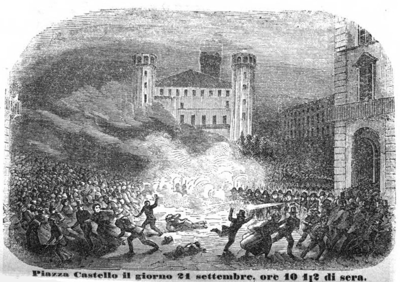 Torino - Piazza Castello il giorno 21 settembre, ore 10 1/2 di sera